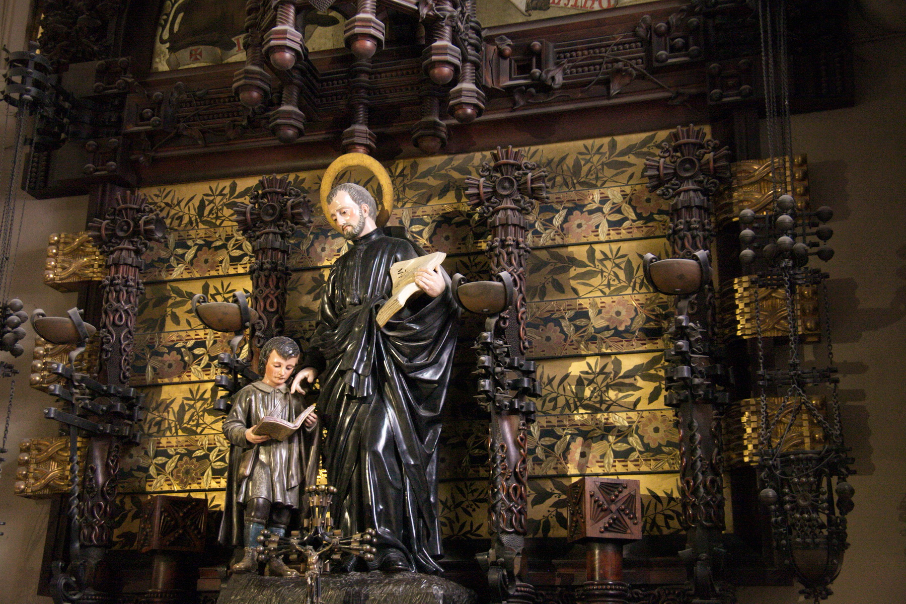 Retaule dedicat a Sant Josep de Calassanç, al Monestir de Montserrat, obra de Francesc Berenguer i Mestres. (1891)